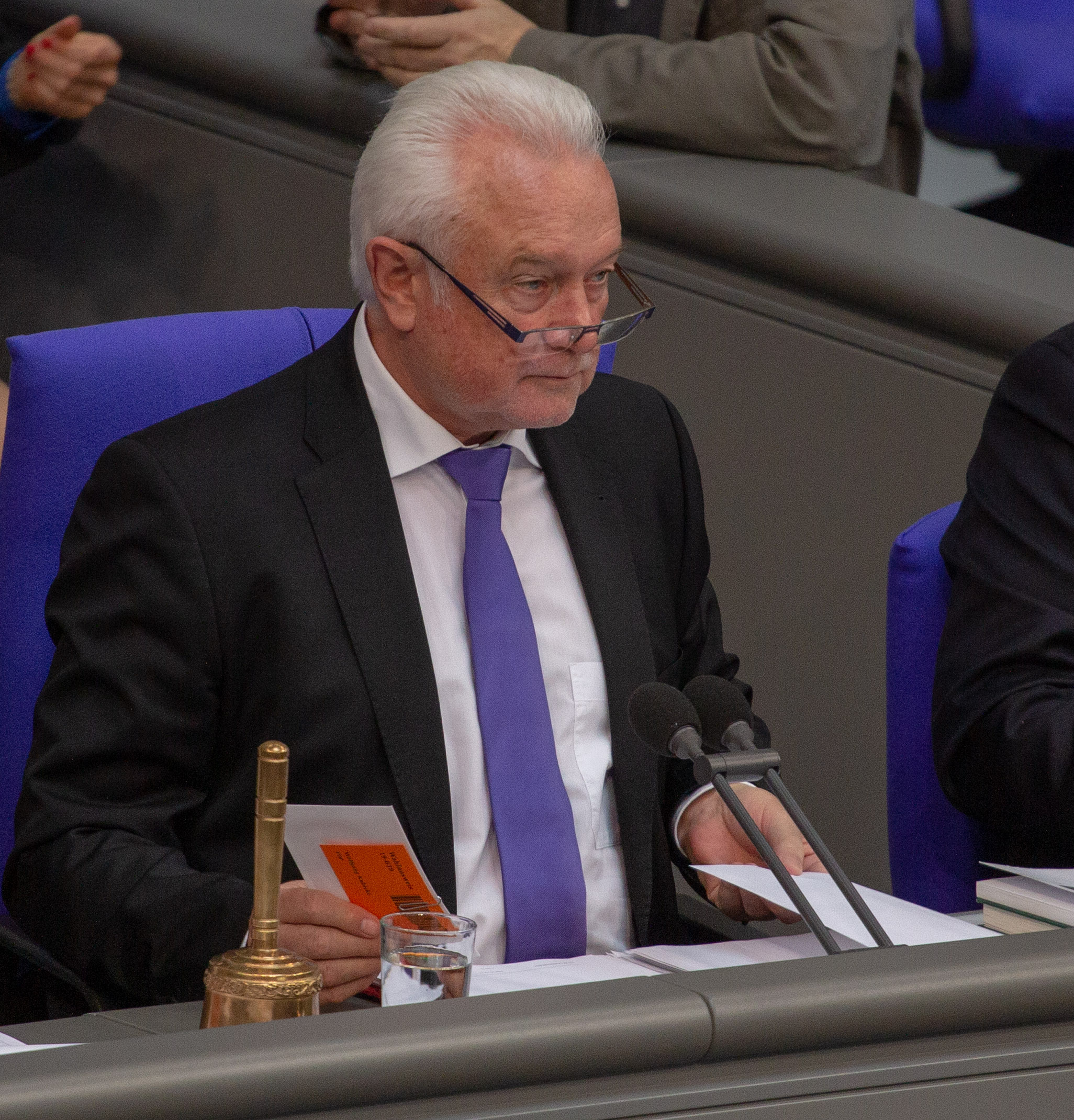 Wolfgang Kubicki, Mitglied des Deutschen Bundestages, während einer Plenarsitzung am 11. April 2019 in Berlin.